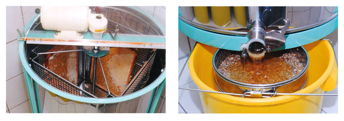 Honigschleuder